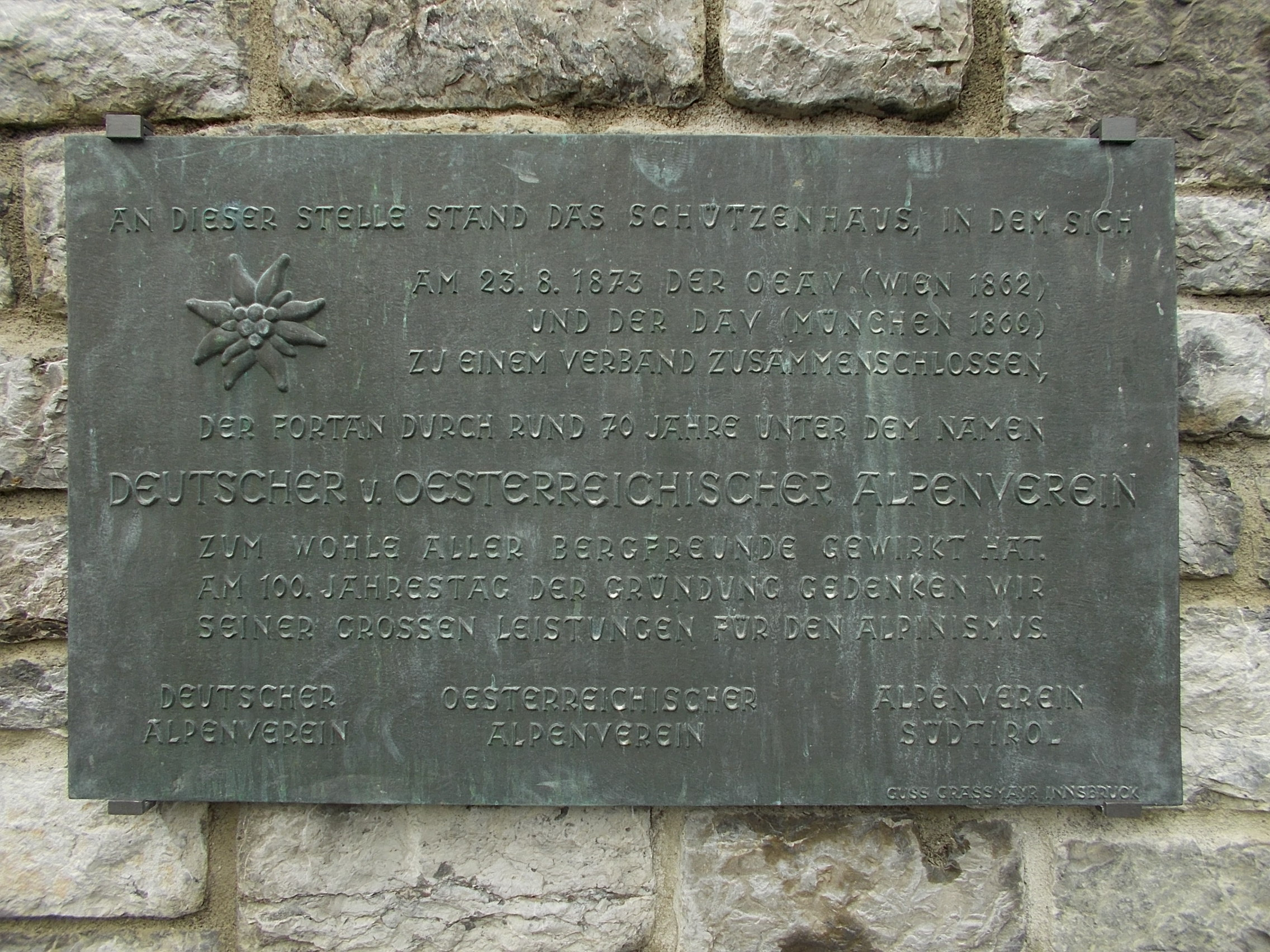 Gedenktafel zur Erinnerung an die Vereinigung von DAV und OeAV am 23.8.1873 am südlichem Treppenaufgang zum Schloßhotel Bludenz